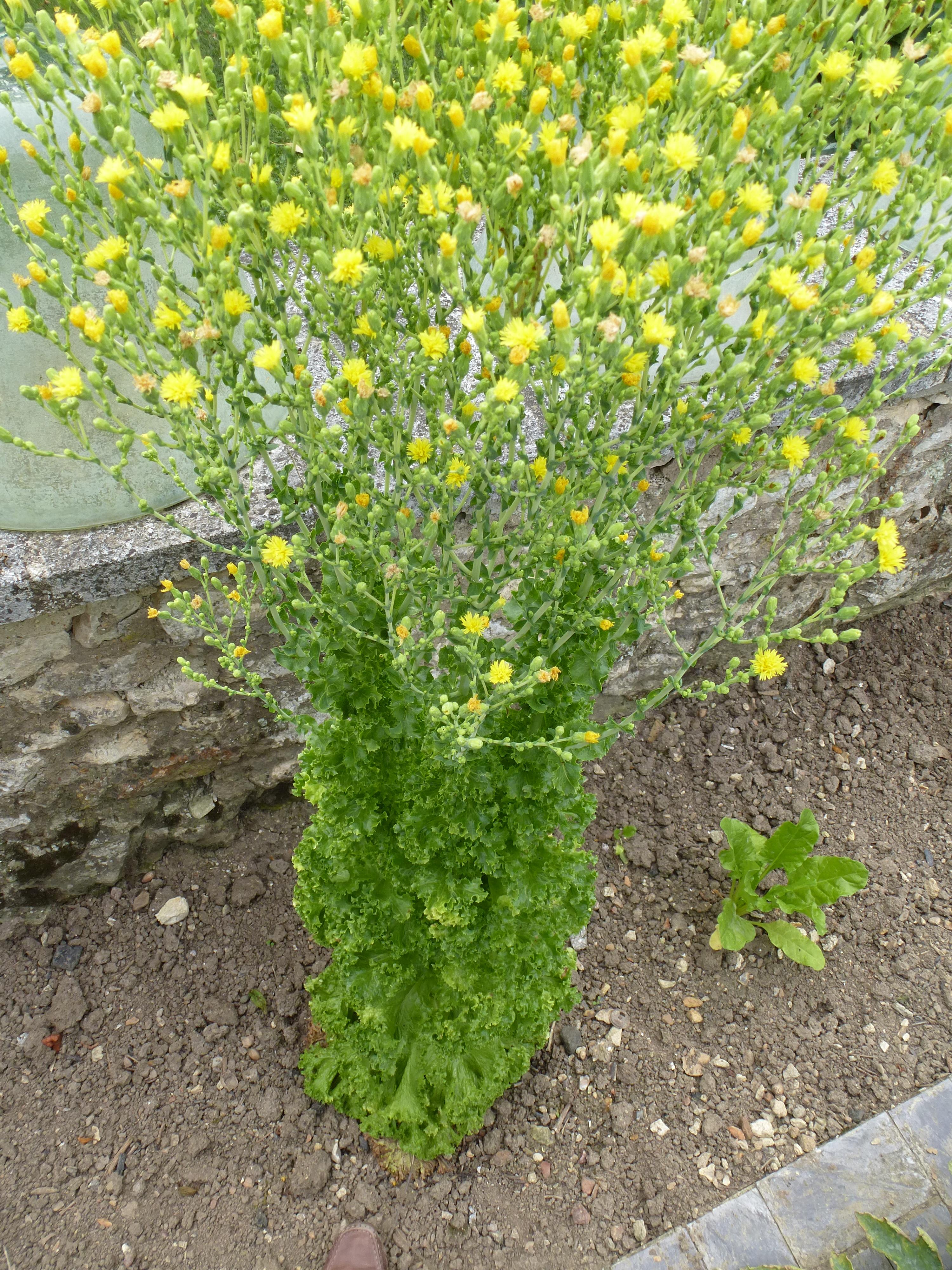 laitue (Lactuca sativa) d'une variétée frisée, en fleurs à la fin de l'été. Région Ile de france, France. Europe.